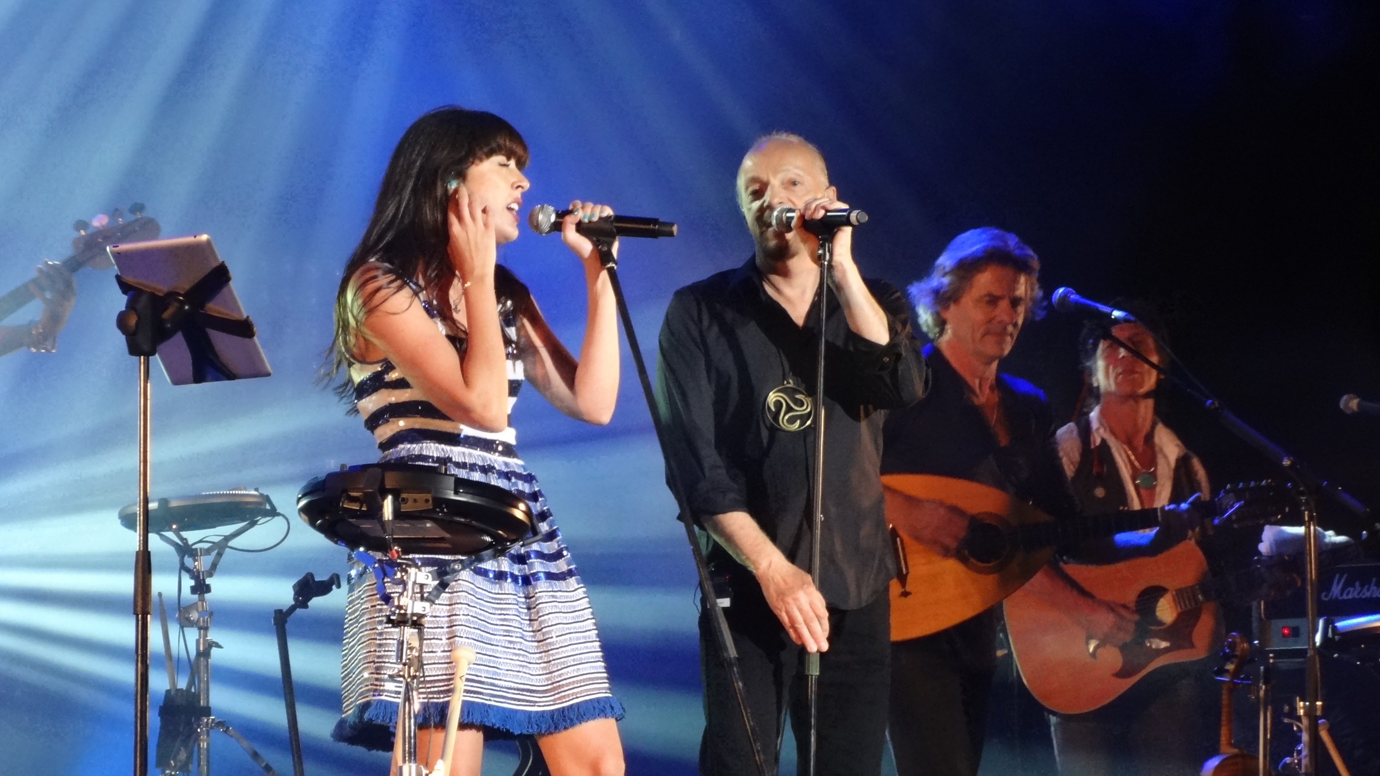 Nolwenn Leroy et Alan Stivell en concert à la Foire aux Vins de Colmar en août 2012